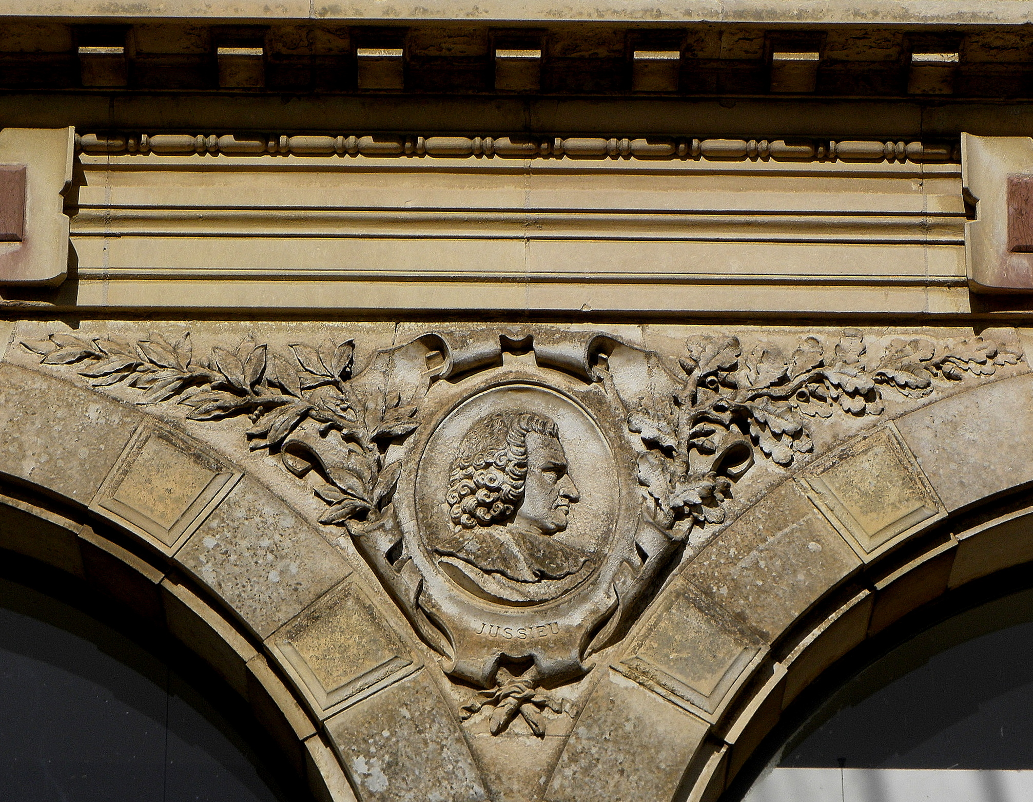 Orangerie du Parc du Thabor à Rennes (35). Jussieu.